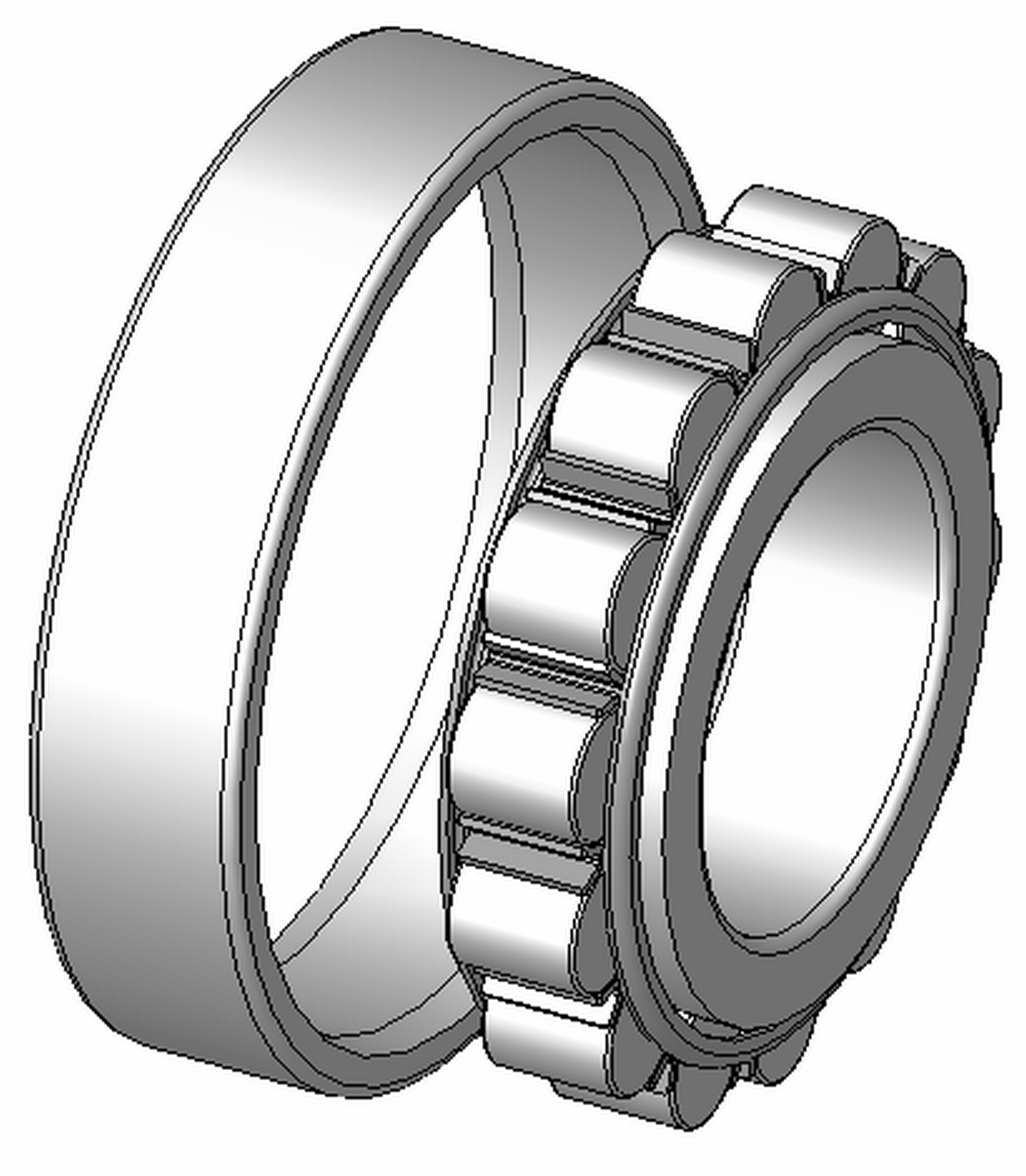 Zylinderrollenlager, Innenring mit beidseitigen Borden, Aussenring ohne Borde, Blechkaefig aus Stahl, zerlegbar, Explosionsdarstellung, Hinweis: Innenaufbau des Lagers (insbesondere des Kaefigs) variiert je nach Hersteller und Baugroesse rolling contact bearings